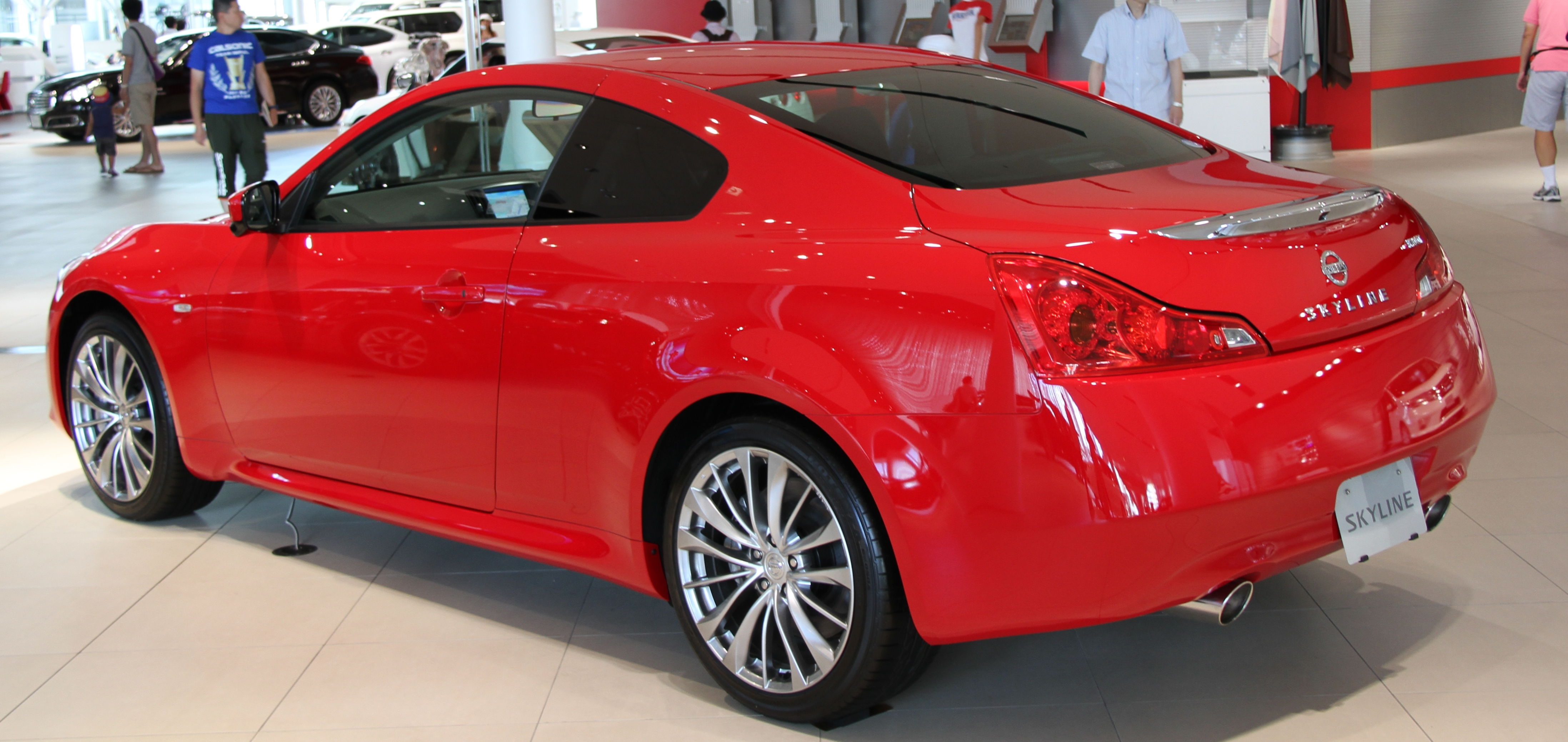 Nissan Skyline Coupe